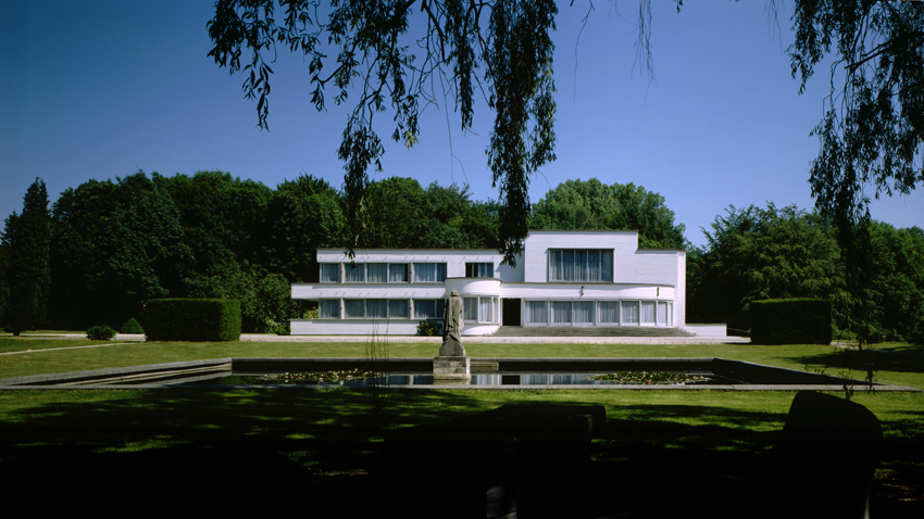 La Chapelle Musicale Reine Elisabeth